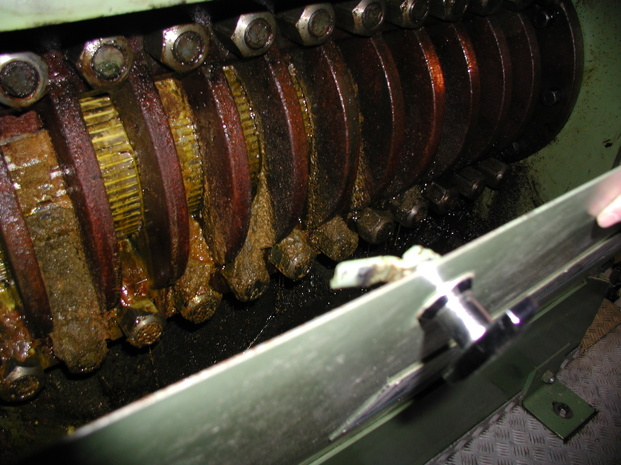 Blick in eine geöffnete Seiherstab-Ölpresse, Foto aufgenommen in der Ölmühle Daniels in Hamminkeln